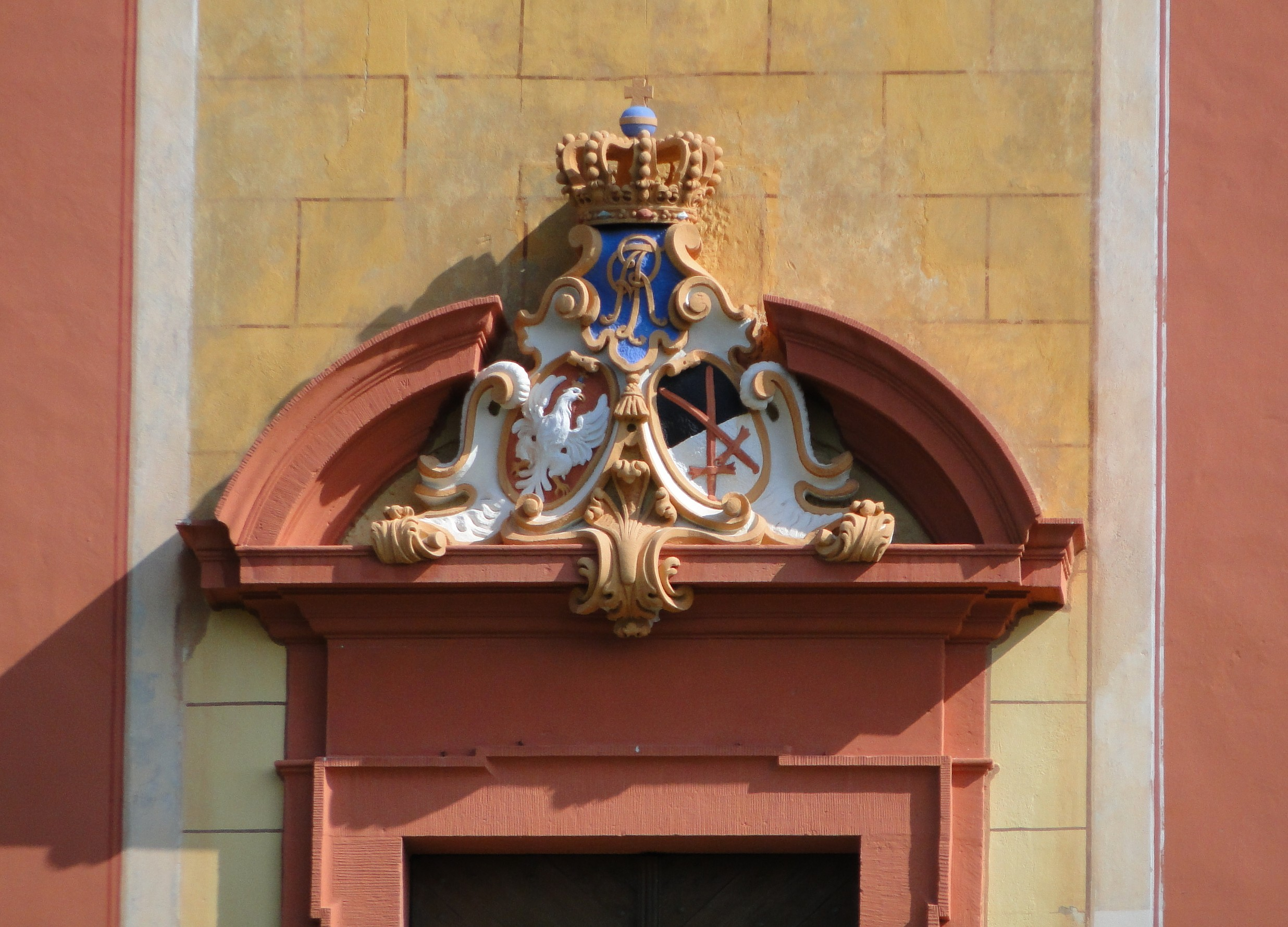 Die Weinbergkirche in Dresden-Pillnitz